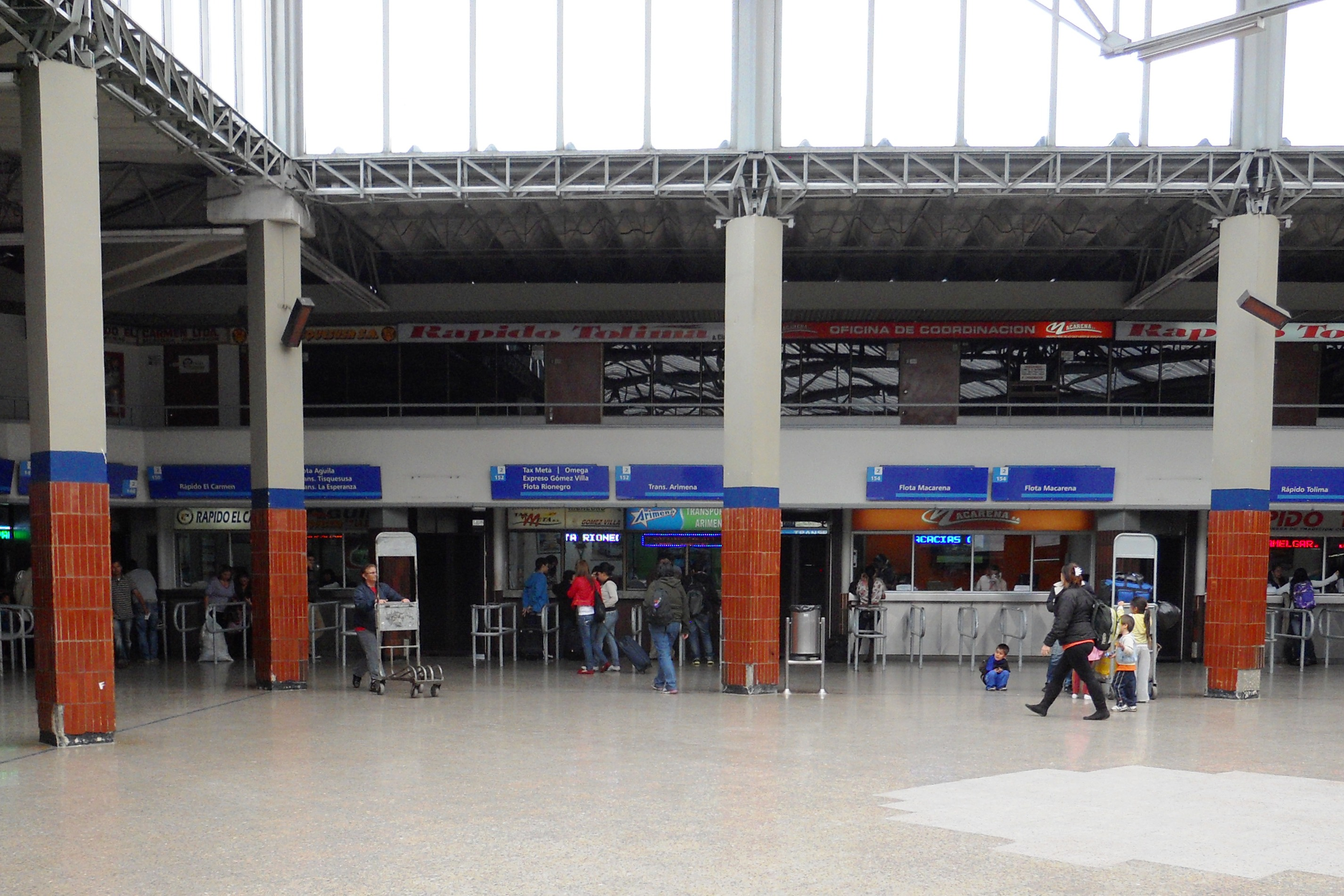 Interior de la Terminal de Transportes de Bogotá.